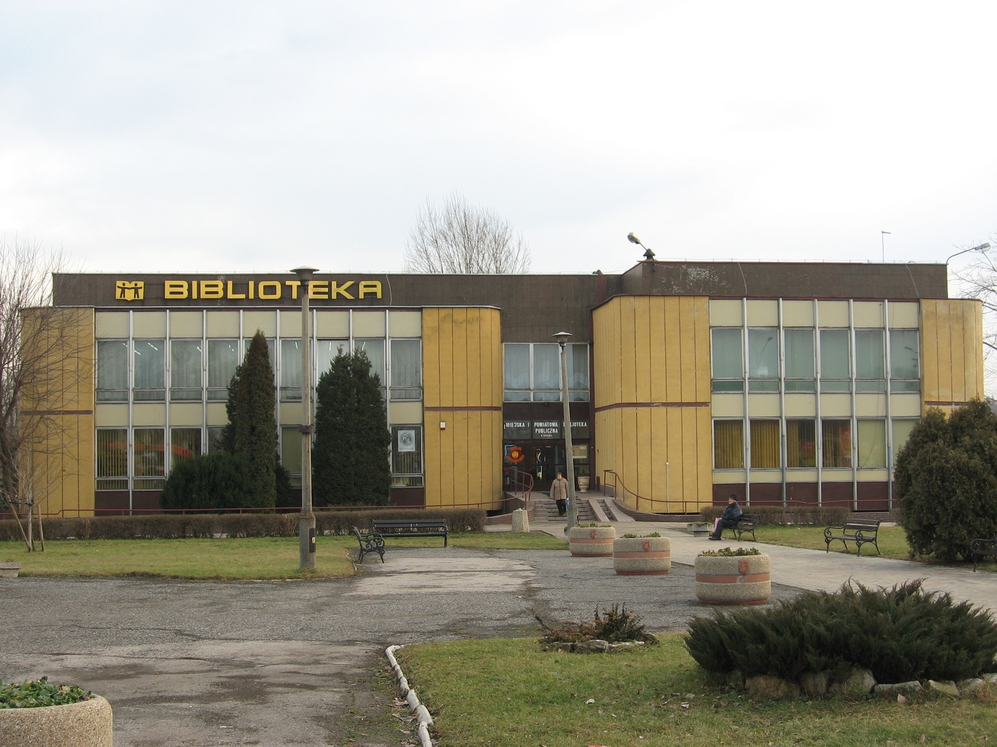 Miejska i Powiatowa Biblioteka Publiczna w Będzinie